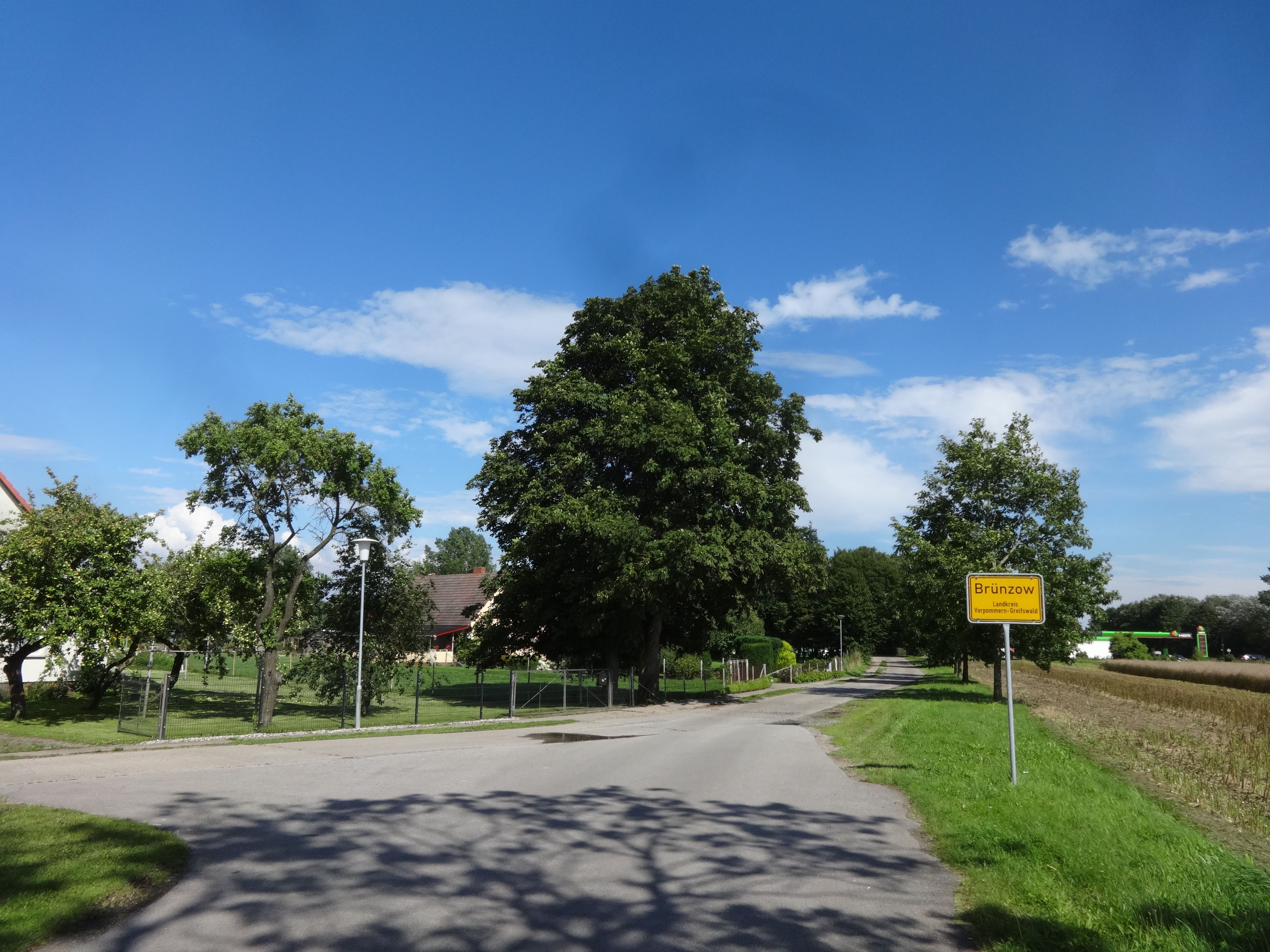 westlicher Ortseingang am Neubauernweg in Brünzow, Landkreis Vorpommer-Greifswald